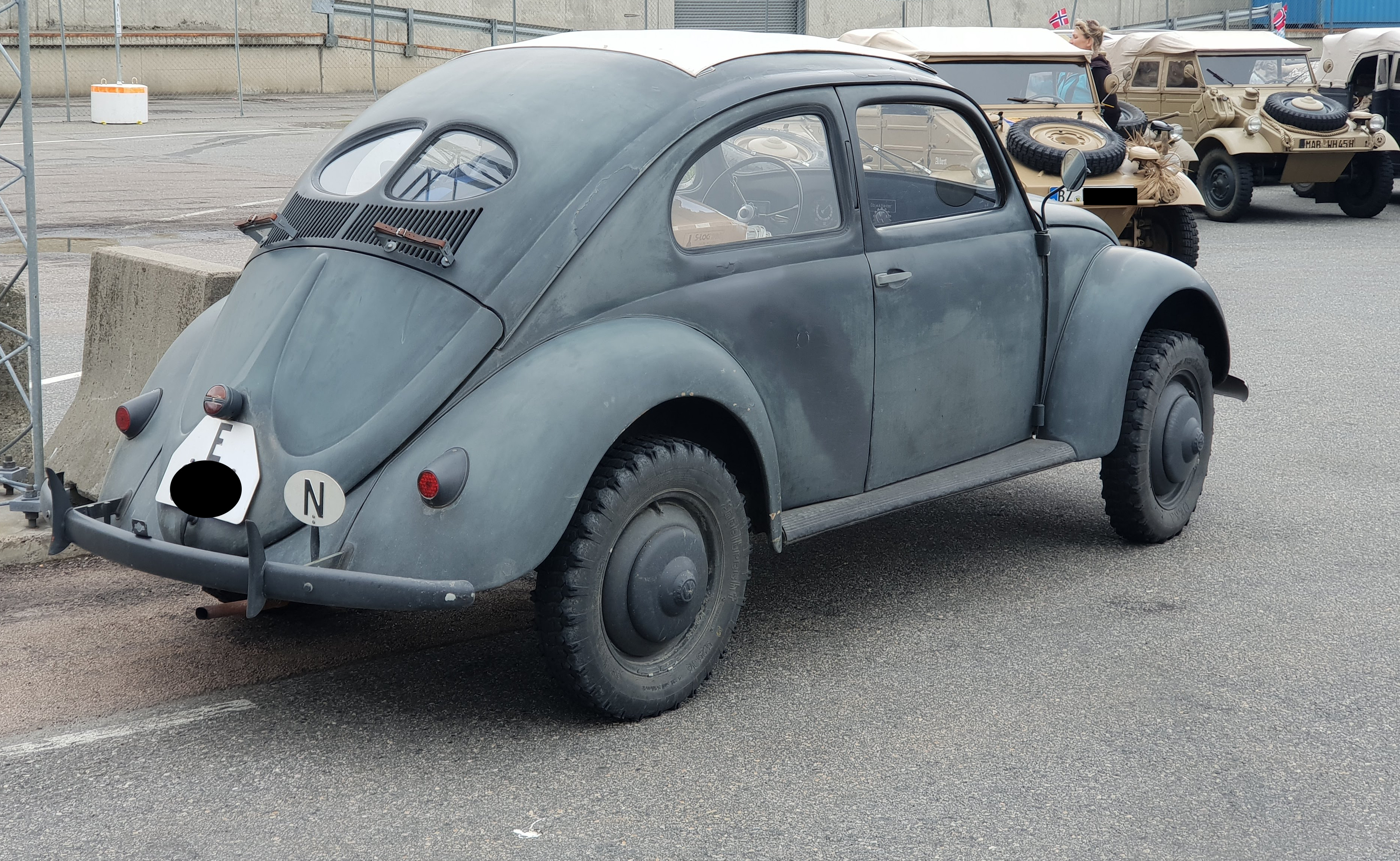 VW aus Vorkriegszeit oder von Wehrmacht, aufgenommen in Oslo / Norwegen